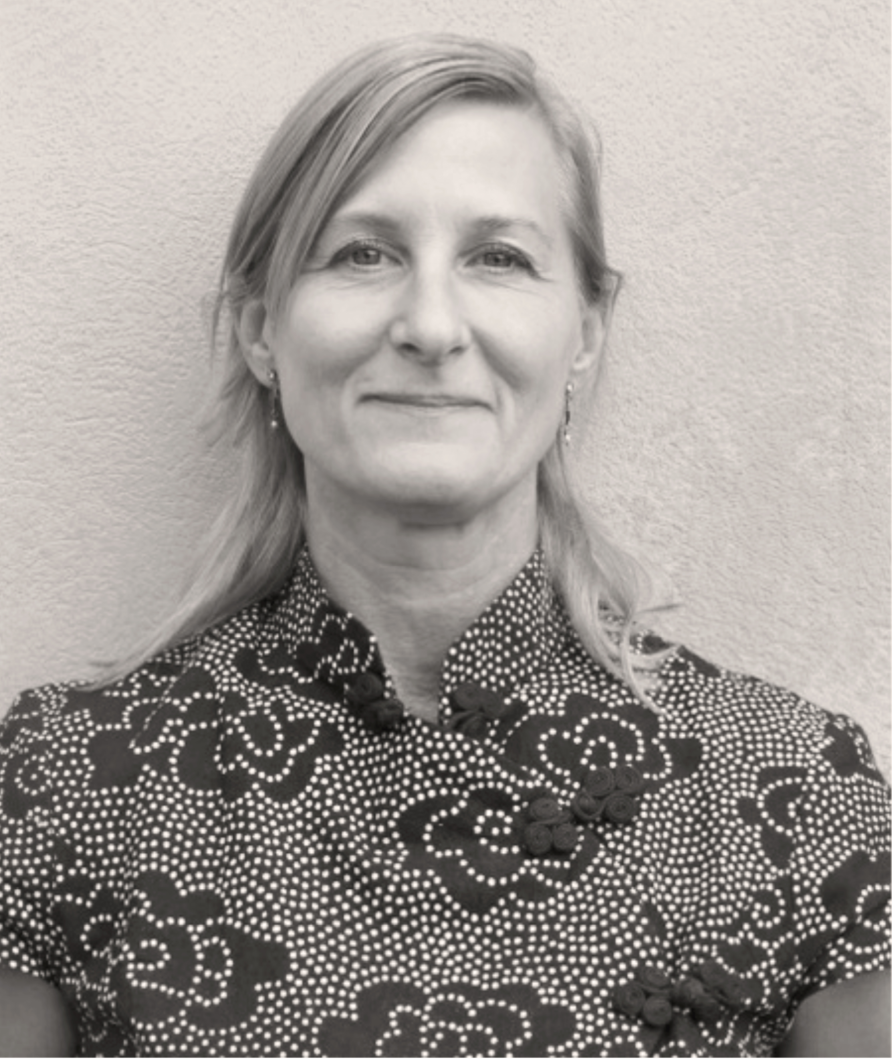 Sara Szyber (foto Ewa Kumlin)